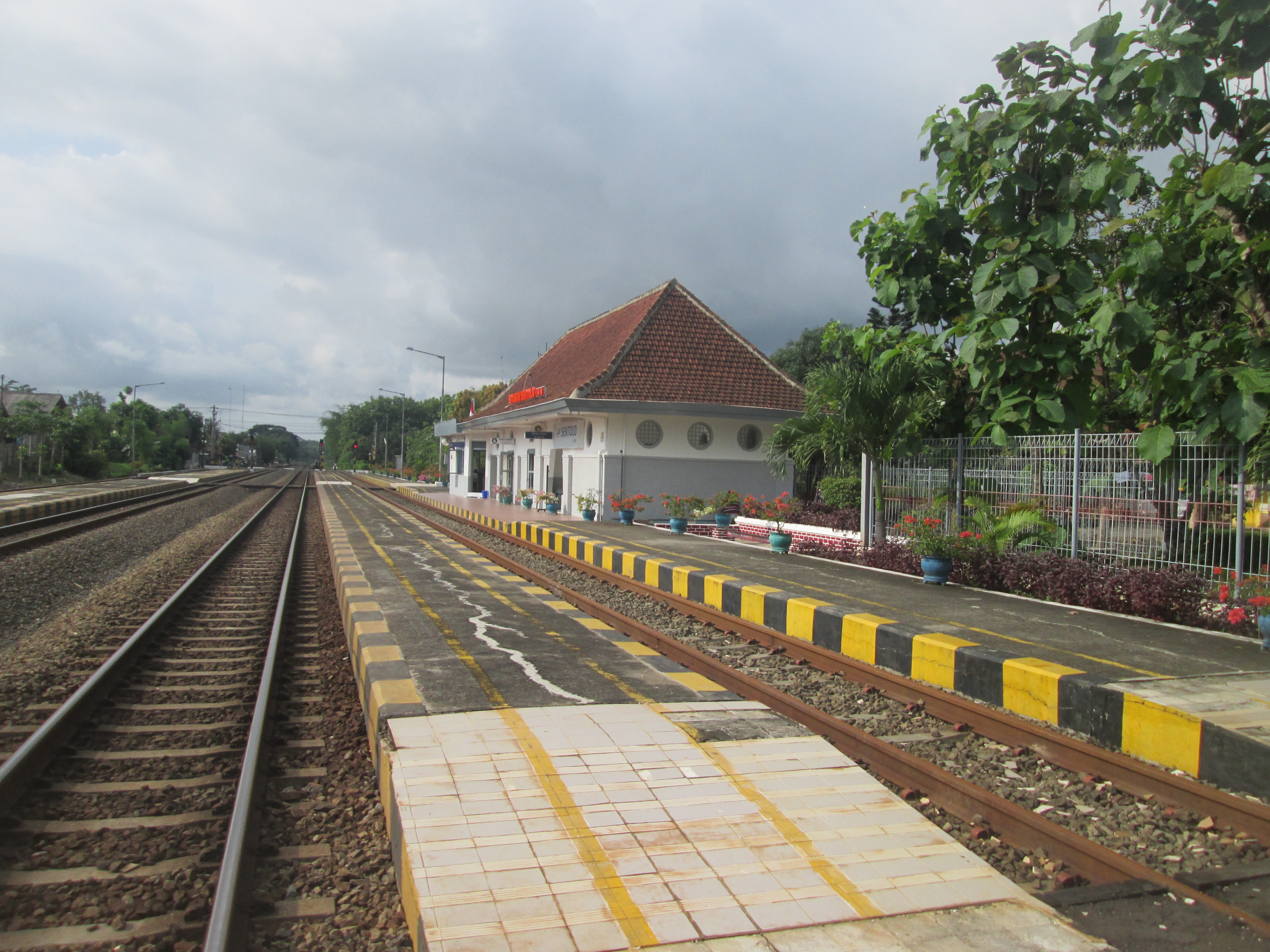 Stasiun Sentolo merupakan stasiun yang terletak di daerah Kulonprogo